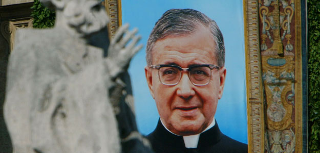 San Josemaría representado en un tapiz durante su canonización en Roma.